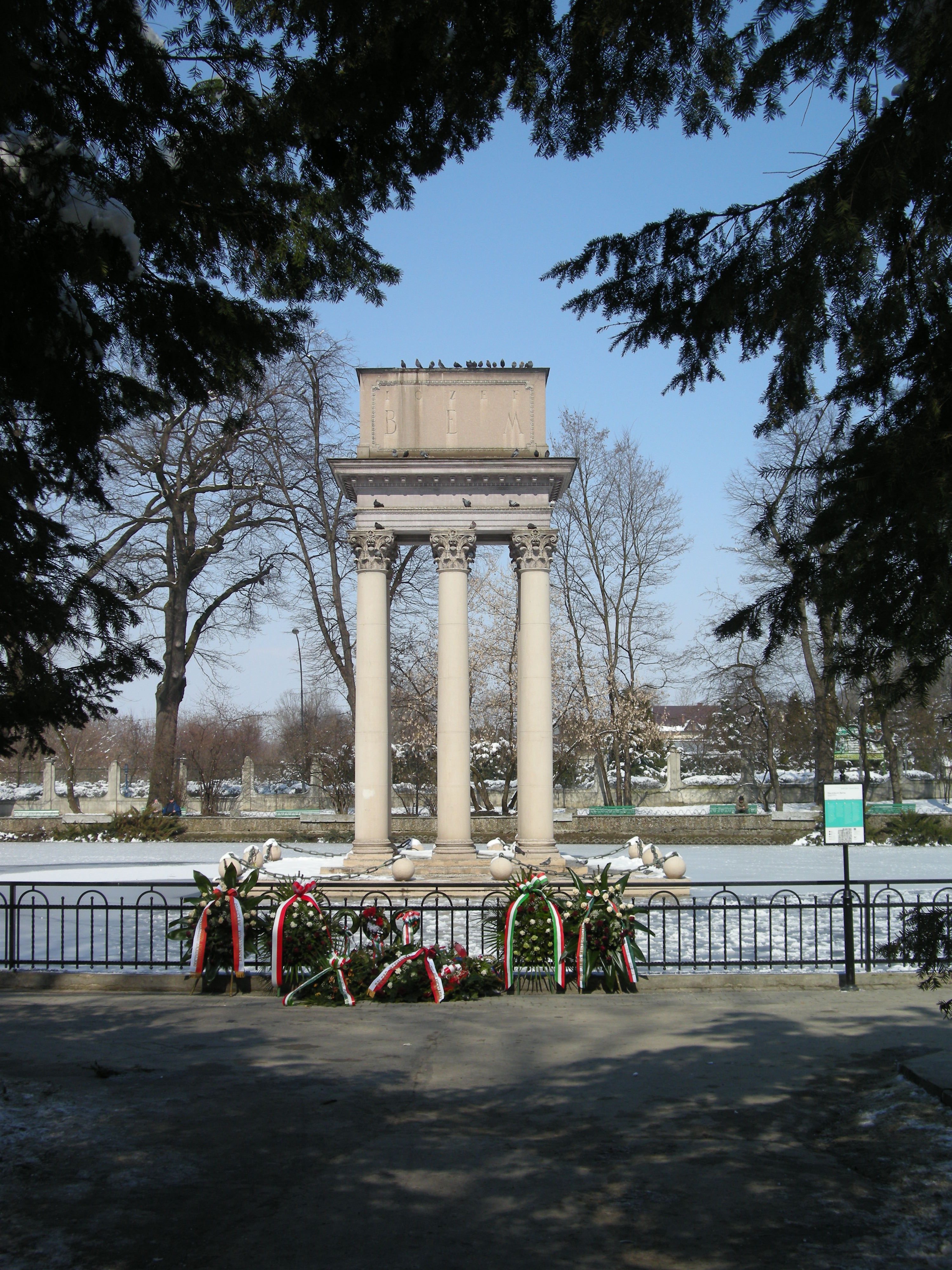 Mauzoleum Gen. J. Bema w Parku Strzeleckim